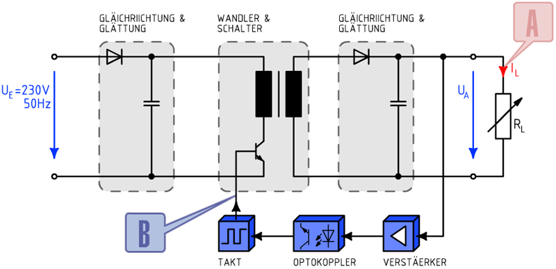 Blockschaltbild vum Grondprinzip vun engem Schaltnetzdeel